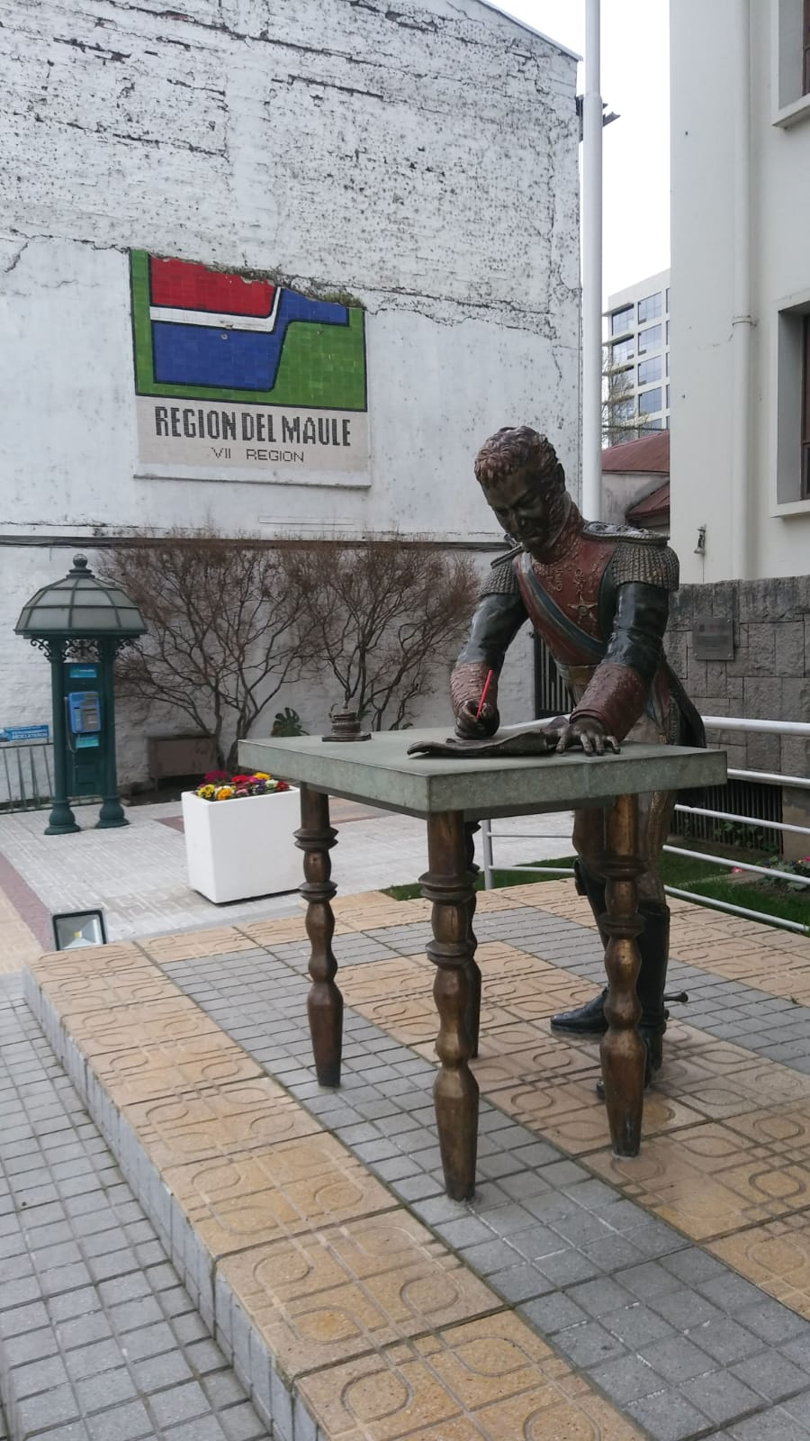 Monumento a Bernardo O'Higgins en Talca (firmando el acta de la independencia el 12 de febrero de 1818, primer aniversario de la batalla de Chacabuco, en ese mismo lugar). El monumento es obra de la escultora Pamela Galleguillos y fue inaugurado en febrero de 2016.[1] La pluma, todavía no reemplazada y sostituida por un lápiz rojo, le ha sido robada en julio de 2018 (véase: El Centro, Año XXX, N.° 10.650, 7 de julio de 2018, pág. 7).